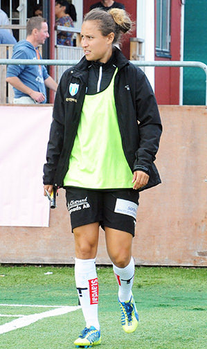 Catrine Johansson (left) and Jane Törnqvist (right) of Kopparbergs/Göteborg FC